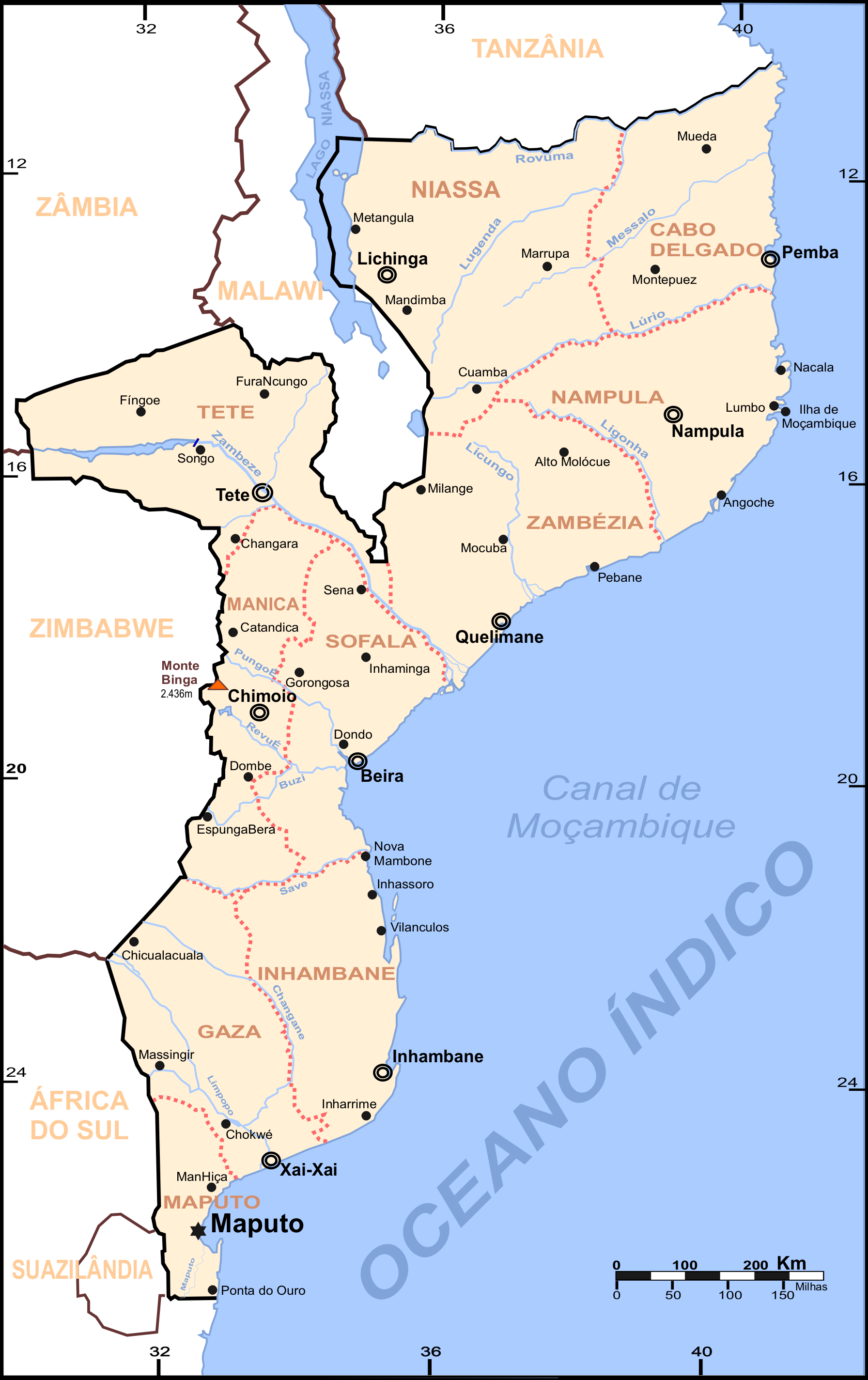 Map of Mozambique (cities)